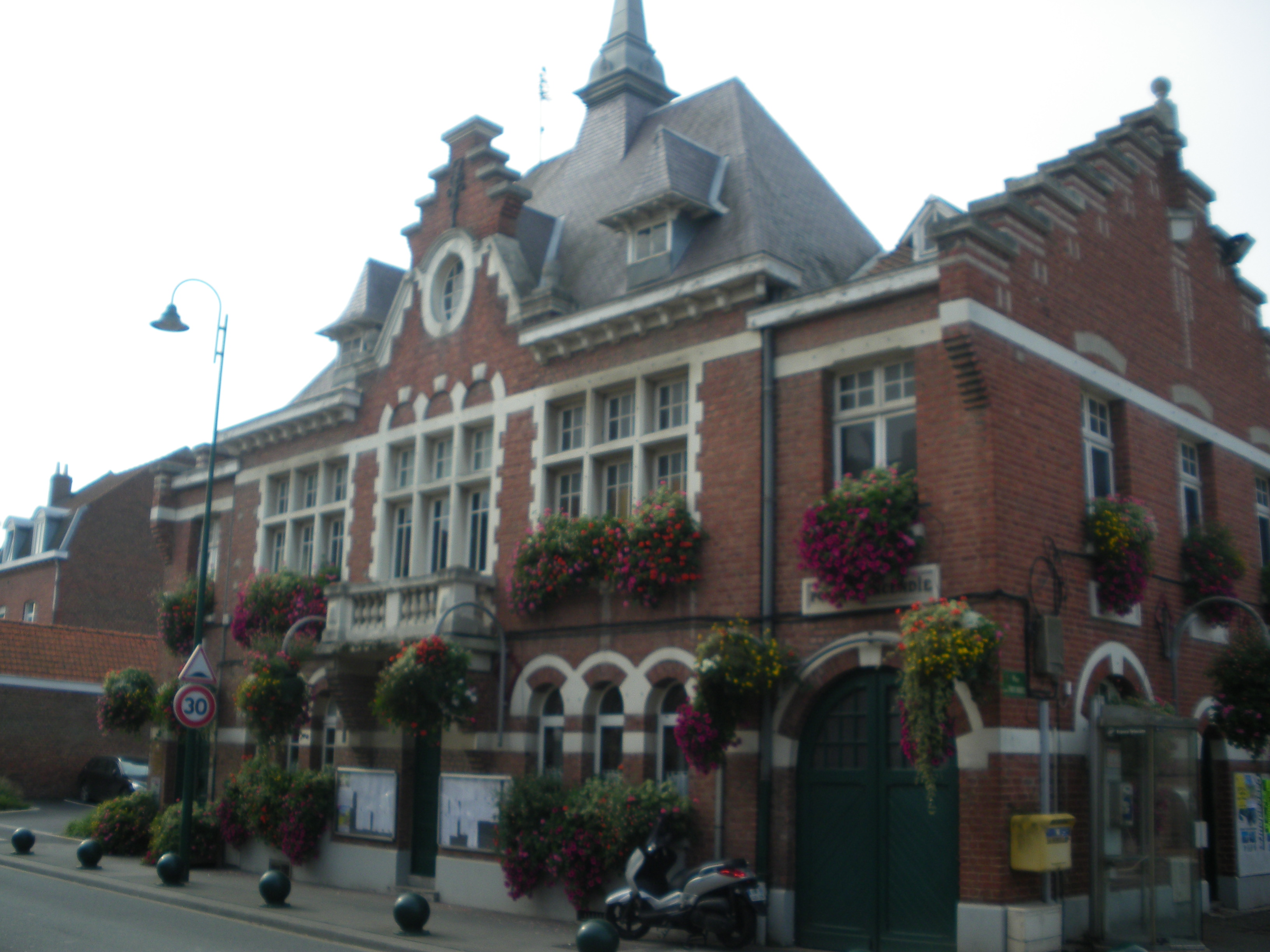 Vue de la mairie de Bois-Grenier.